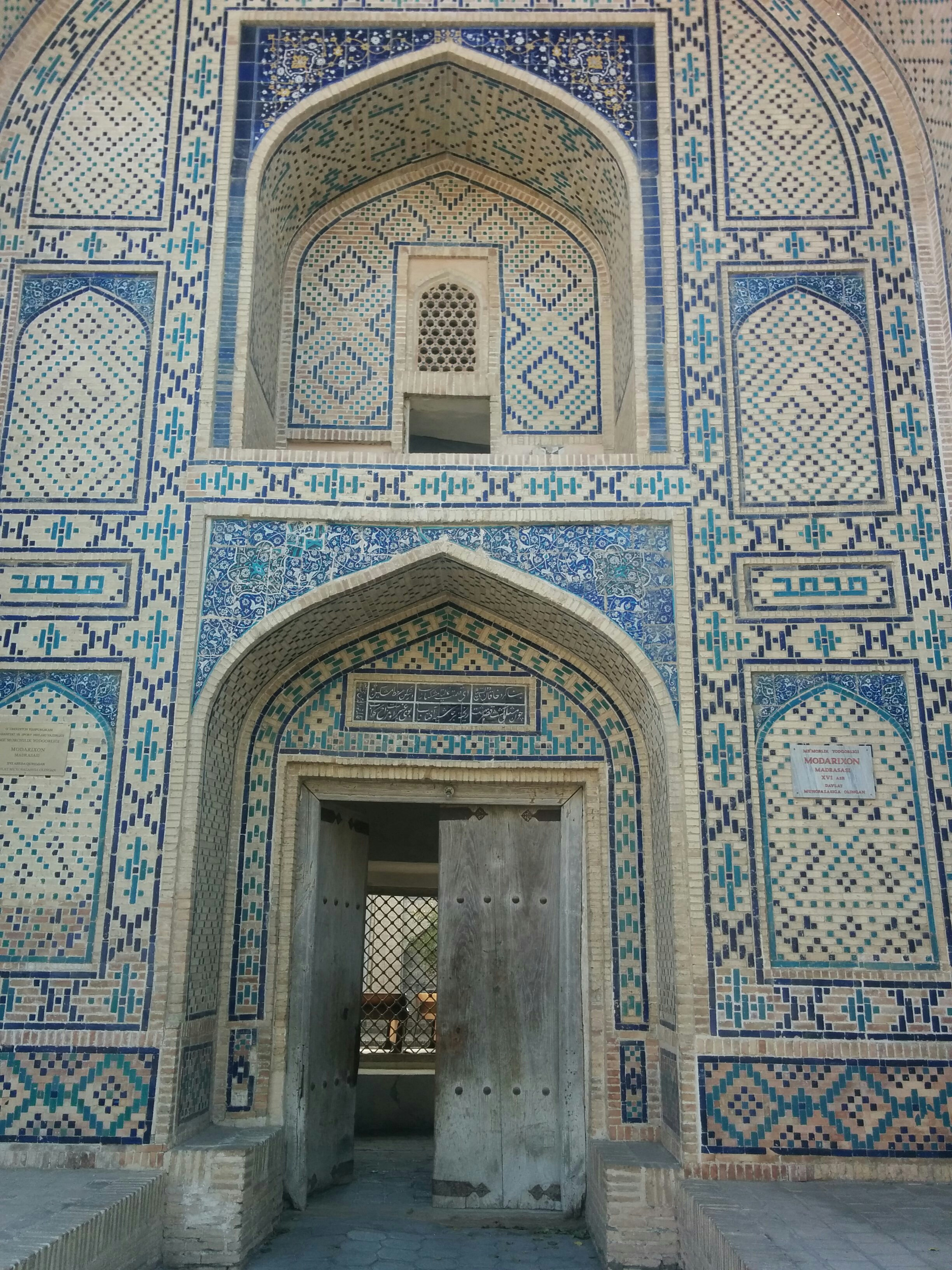 Buxorodagi Qo'sh madrasa ansamblining janubiy qismida joylashgan me'moriy yodgorlik